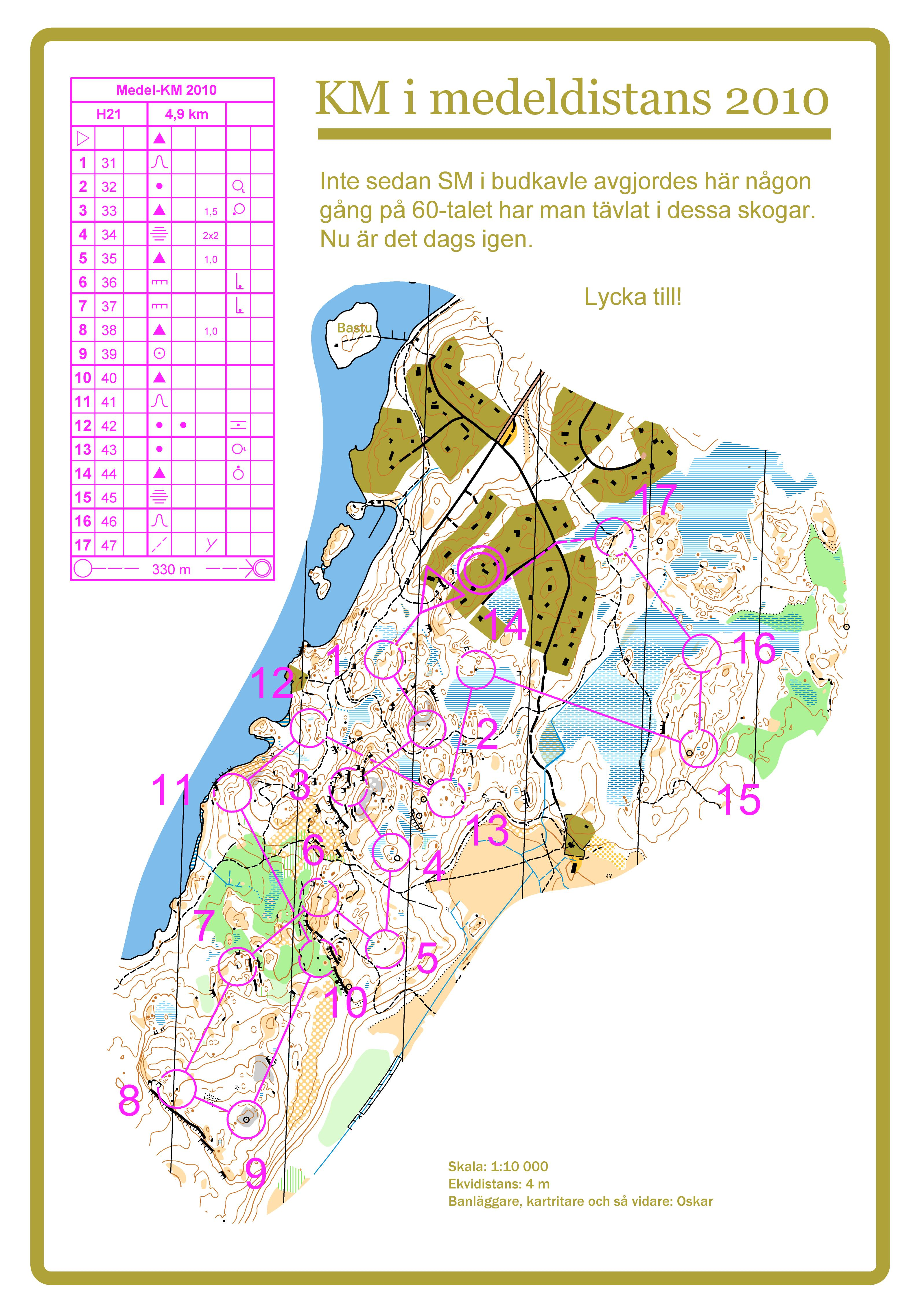 Varsågoda att quickrouta!